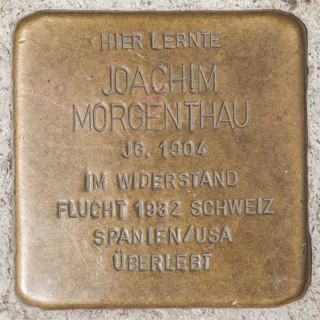 Stolperstein in Coburg Joachim Morgenthau